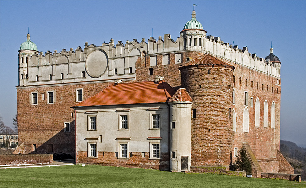 Golub-Dobrzyń castle. Author: Adam Kumiszcza